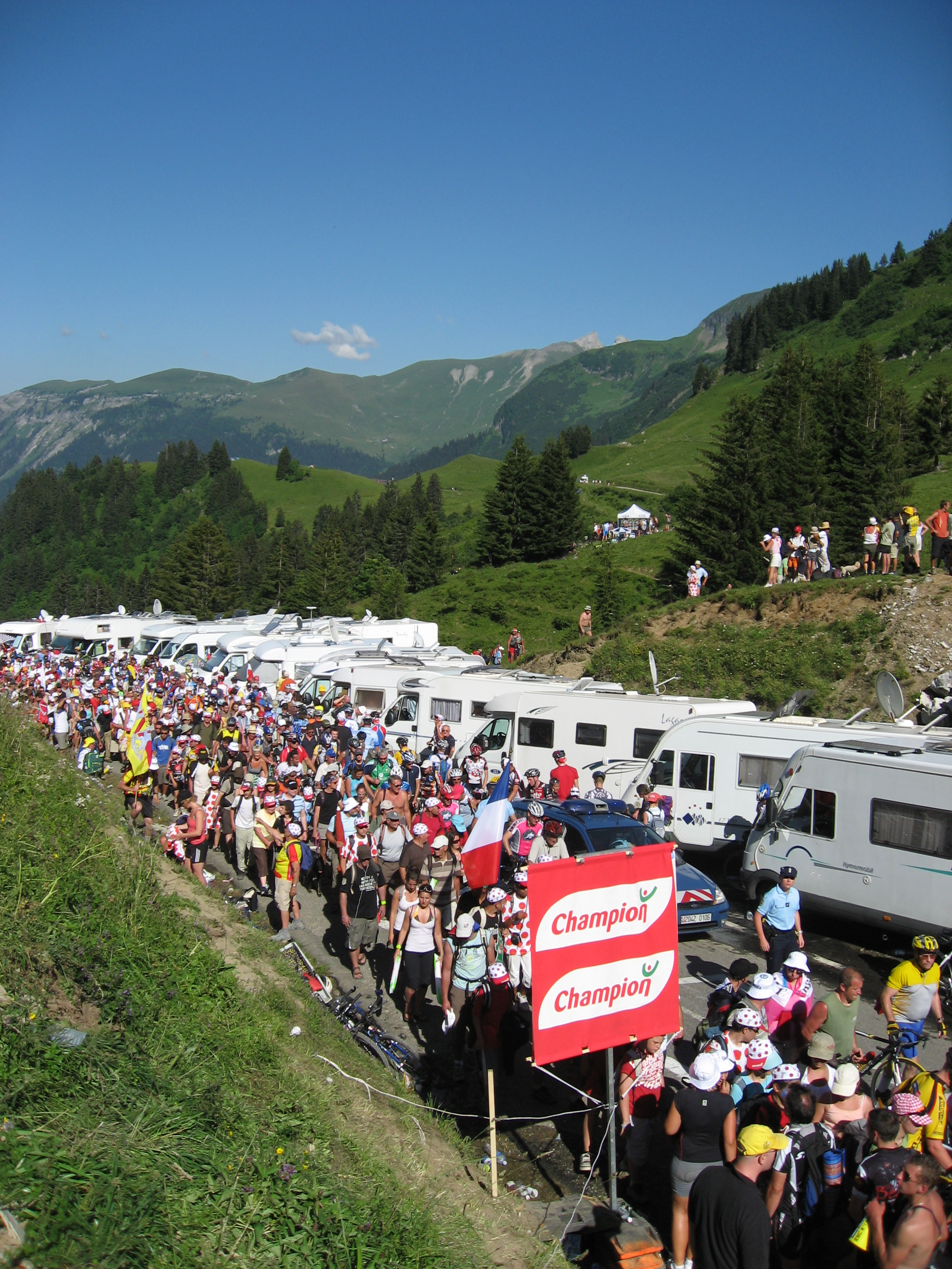 The Tour de France peloton (2007 Tour de France) on the Col de la Colombiere